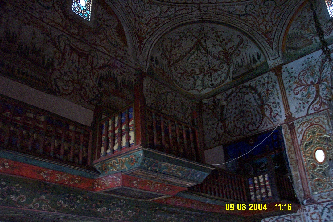 Edhem Beyova mešita v Tiraně.